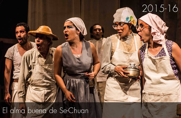 Espectáculo "El alma buena de Se-Chuan"